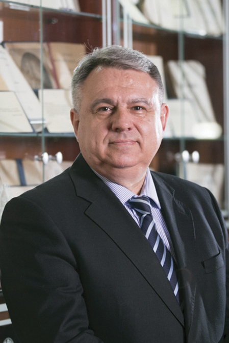 Српски (ћирилица): Љубомир Стајић